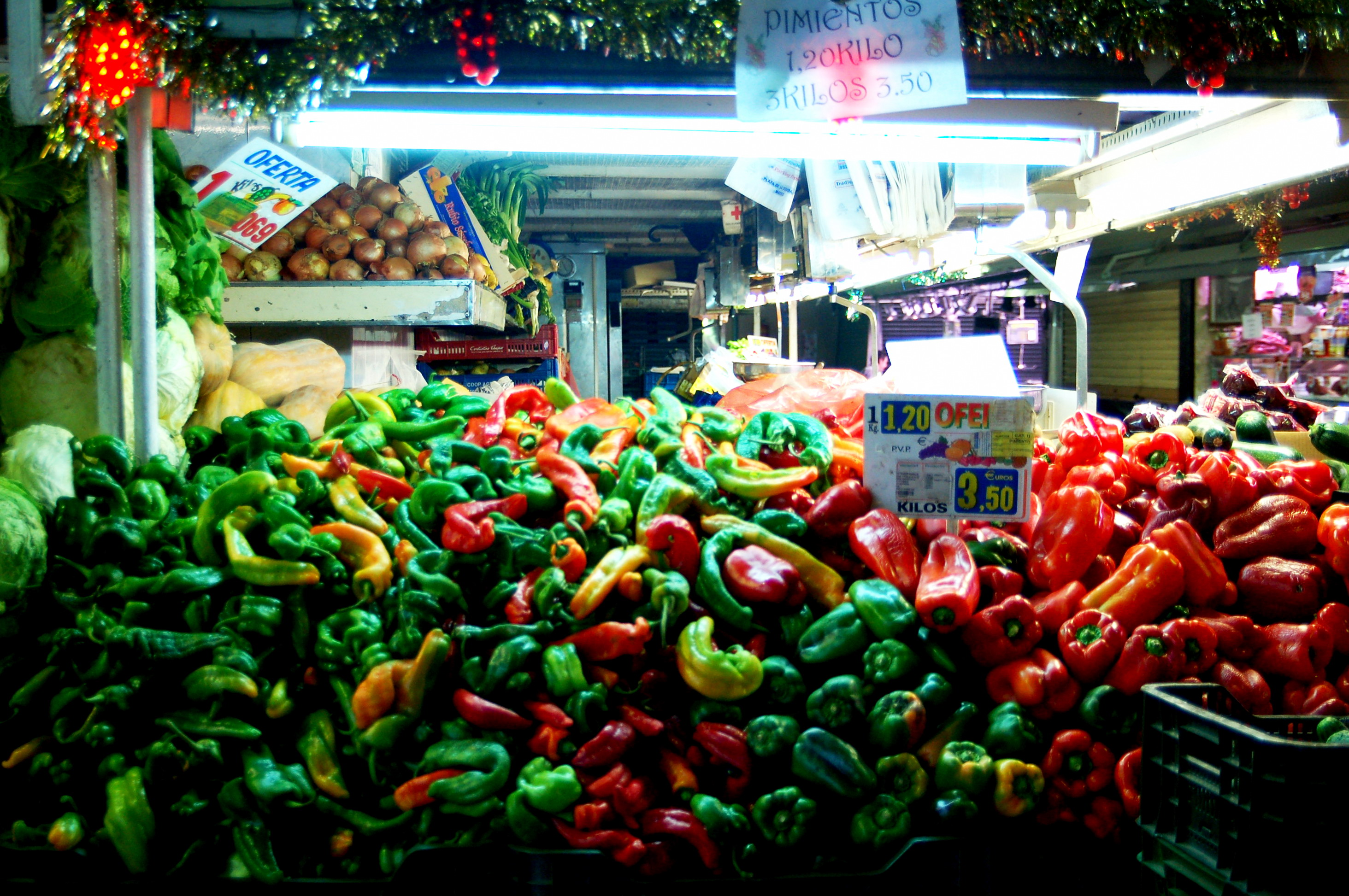 Venta nun mercáu.